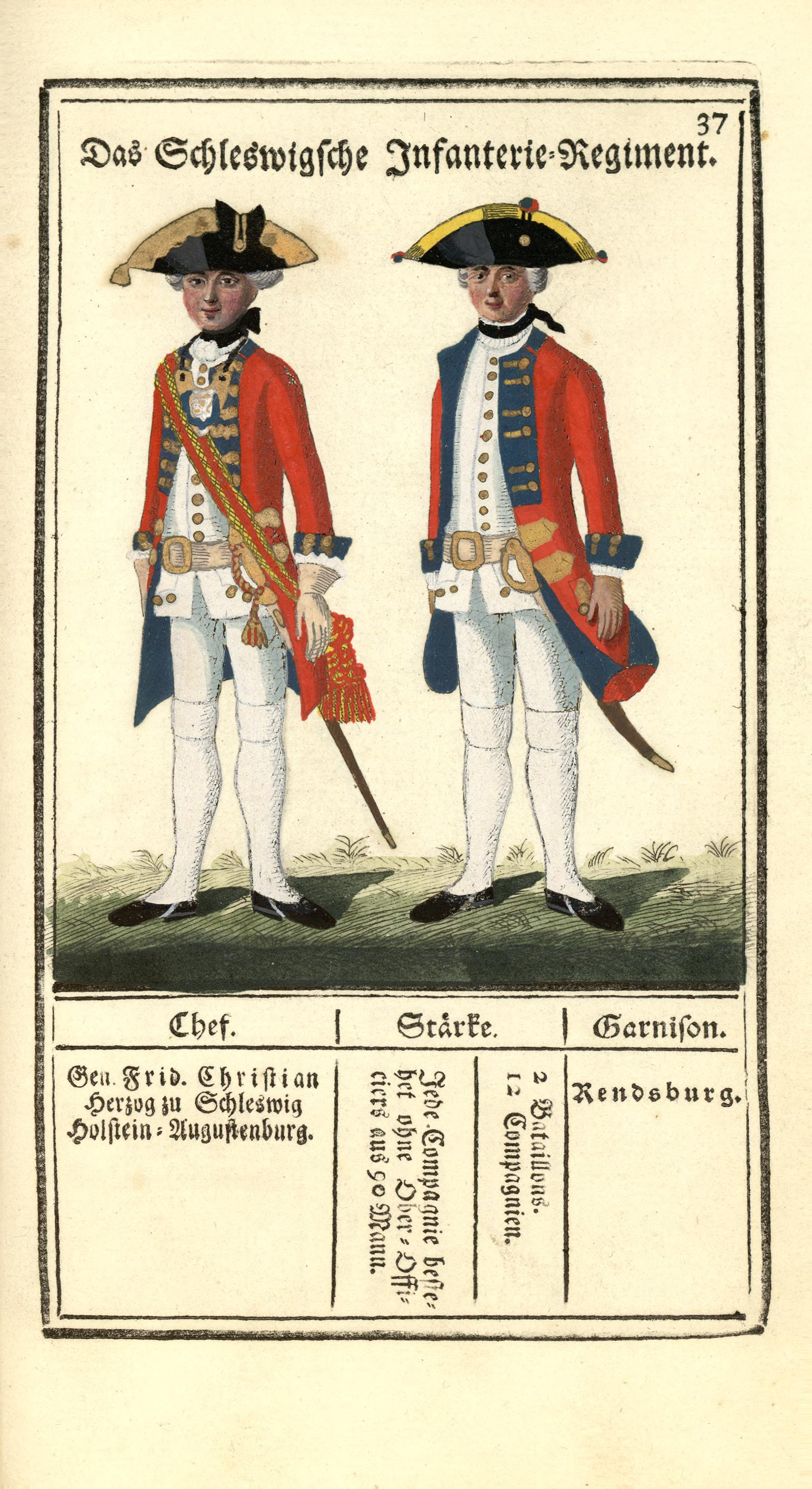 Illustrasjon hentet fra boken "Vorstellung der sämtlichen Königl. Dänischen Armee" av Bertram, Carl og utgitt av Carl Bertram (dk, 1763)